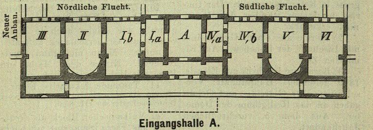 Floor plan of National Archaeological Museum of Athens in 1881. Plan du Musée national archéologique d'Athènes en 1881.